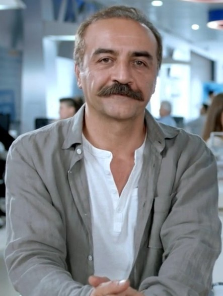 Yılmaz Erdoğan'ın da oynadığı Finansbank | CardFinans reklamından bir kare